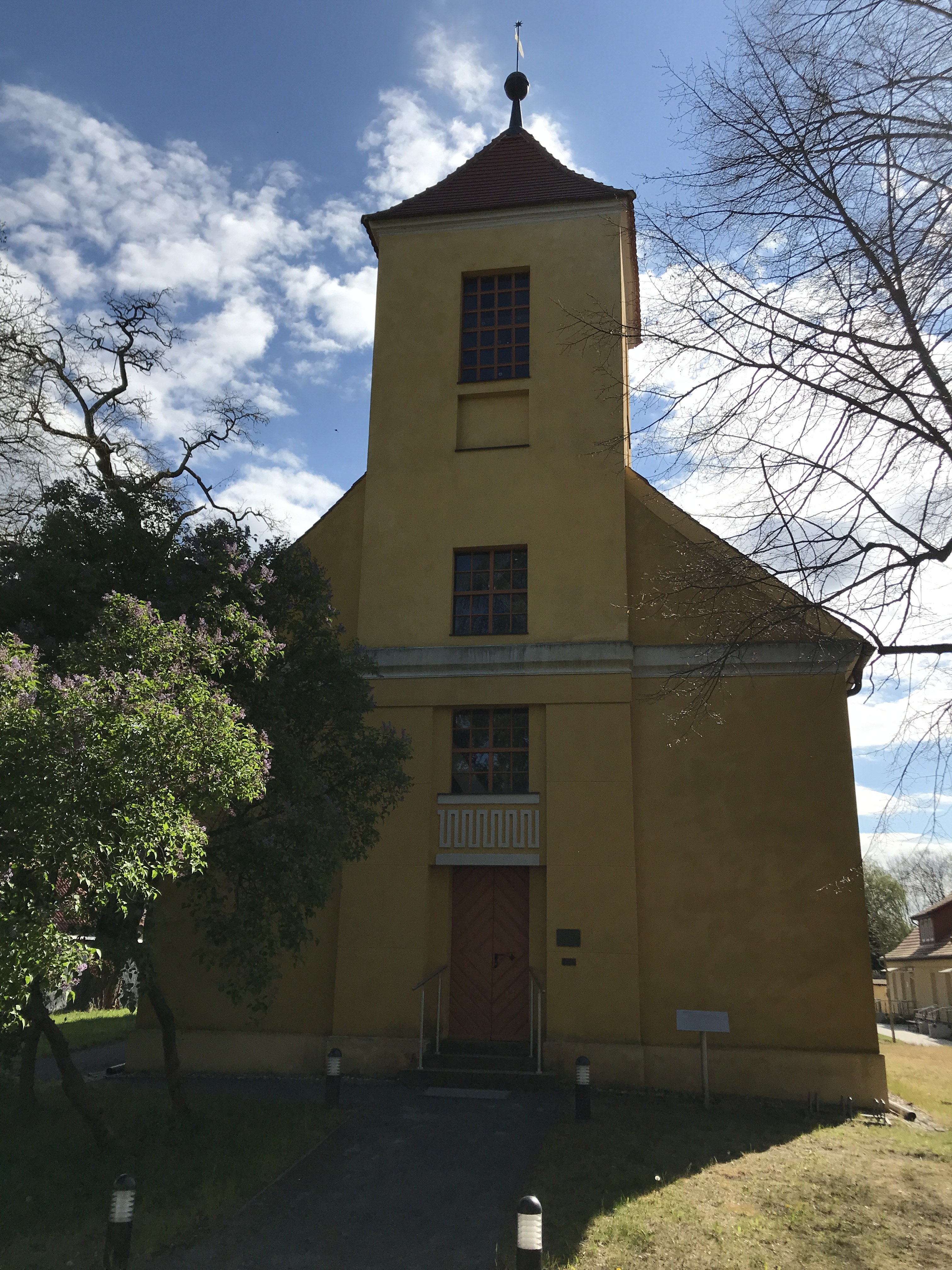 Die Dorfkirche Wernsdorf ist eine Saalkirche aus dem Jahren 1801 bis 1803 in Königs Wusterhausen. Im Innern steht unter anderem eine Hufeisenempore.